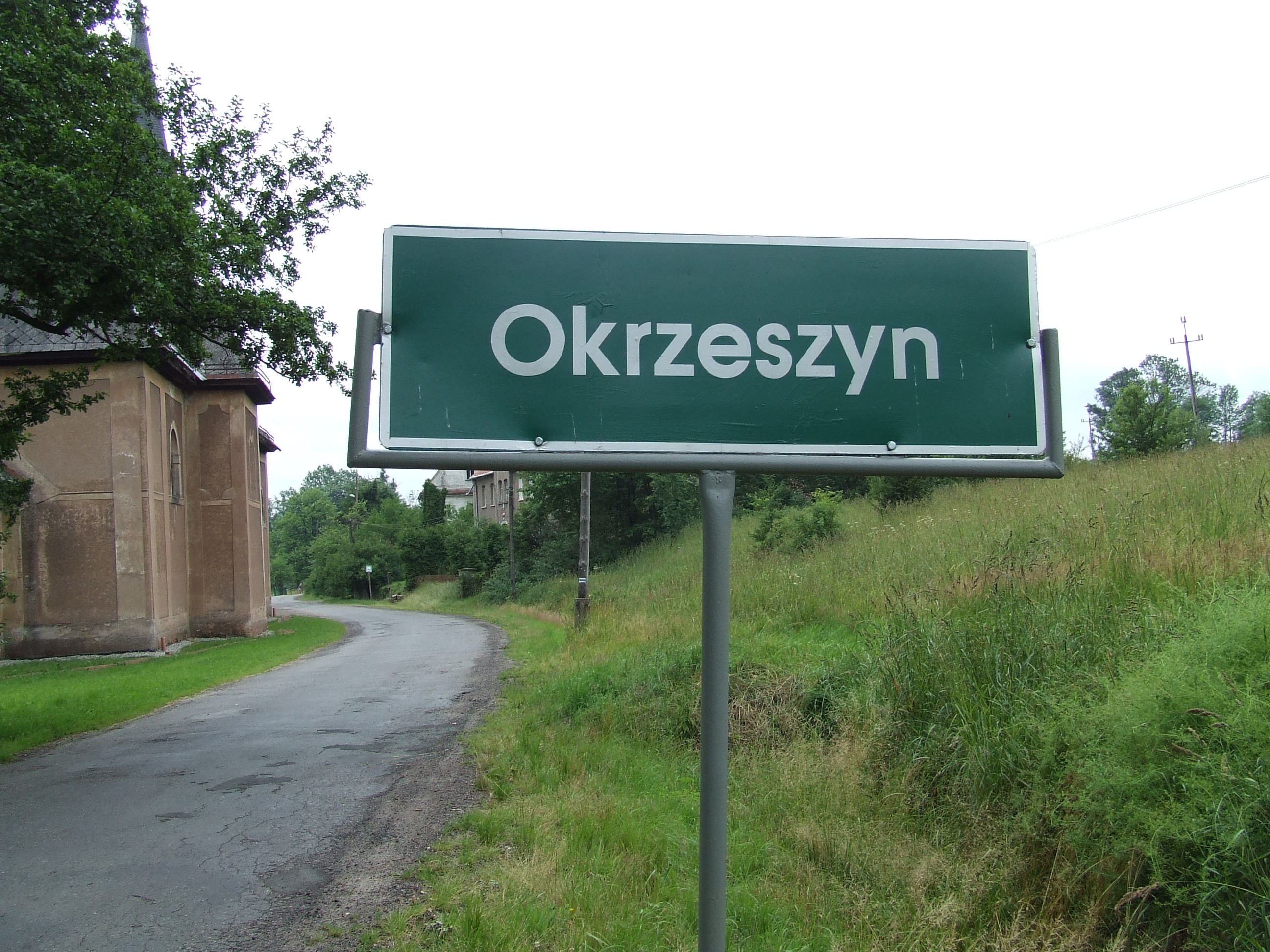 Okrzesyn,Dorfzeichnung